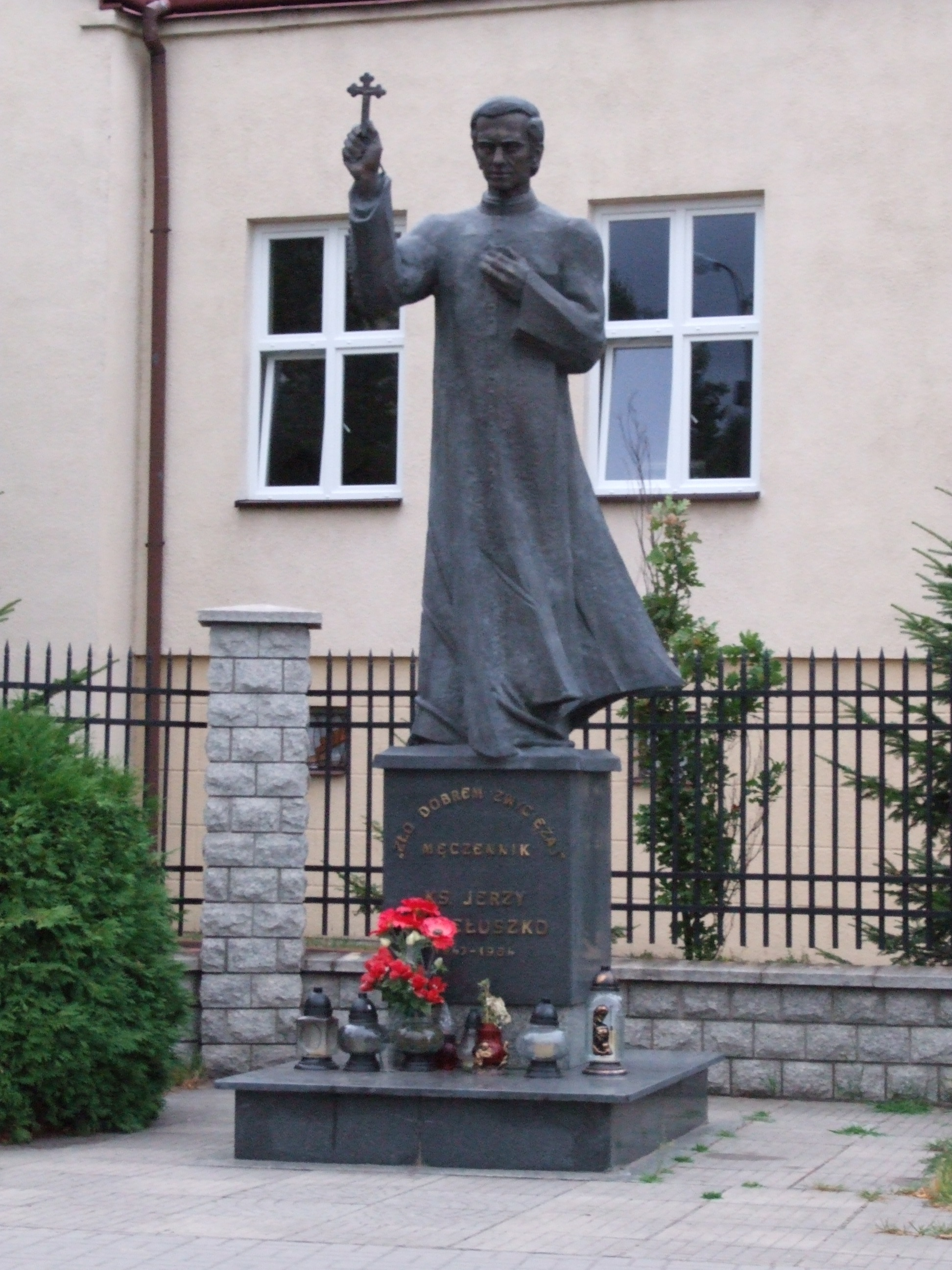 Pomnik księdza Jerzego Popiełuszki pod kościołem Św. Trójcy w Ząbkach